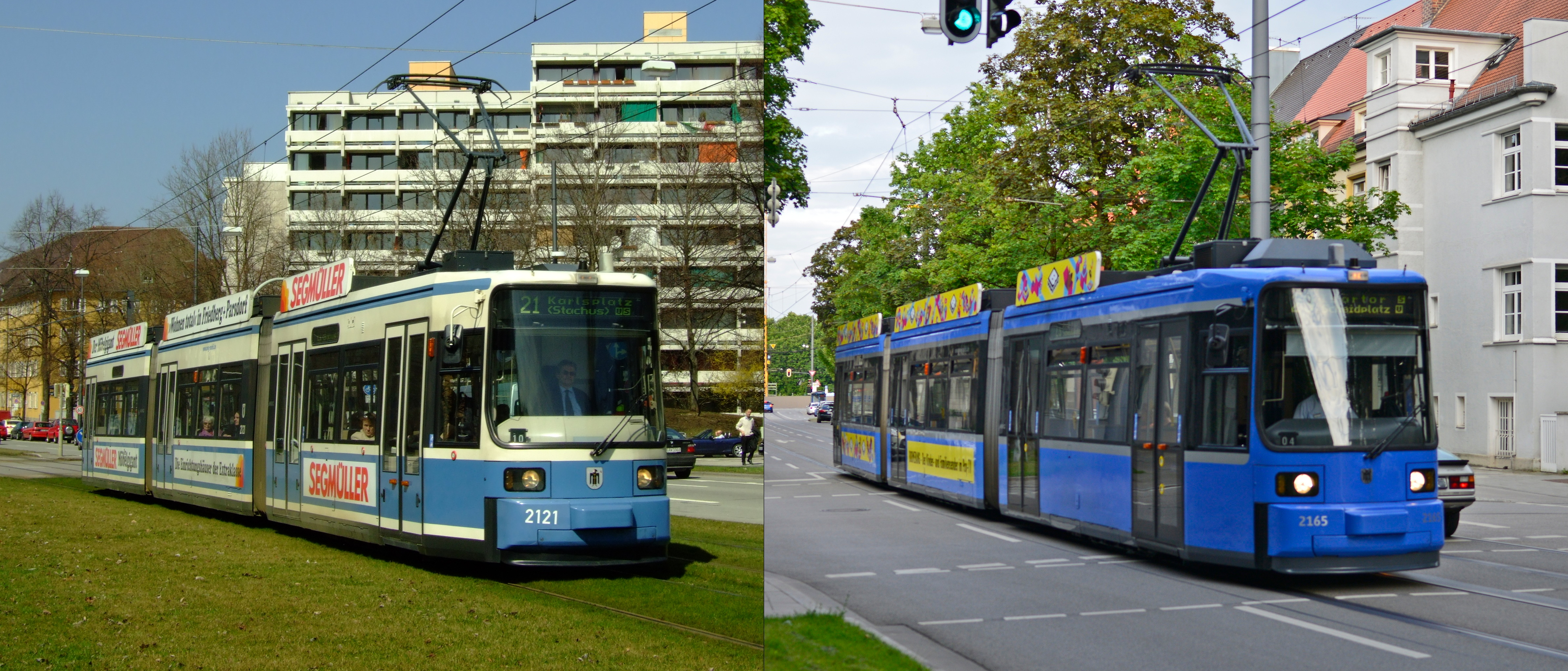 Straßenbahn der Baureihe R2.2 links im alten, rechts im neuen Desigen